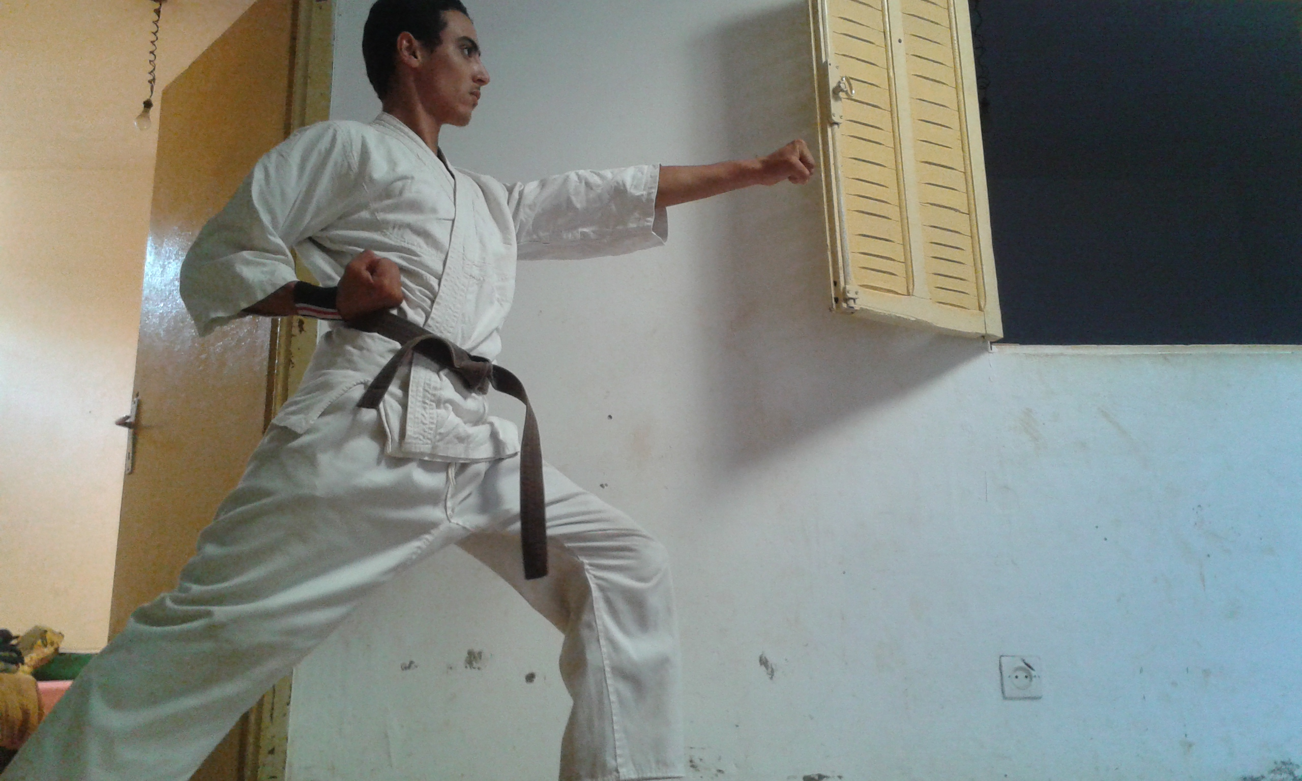 Coach at the karate sinsi metre استاذ كاراتيه الكاراتيه تعلم الكاراتيه صور الكاراتيه